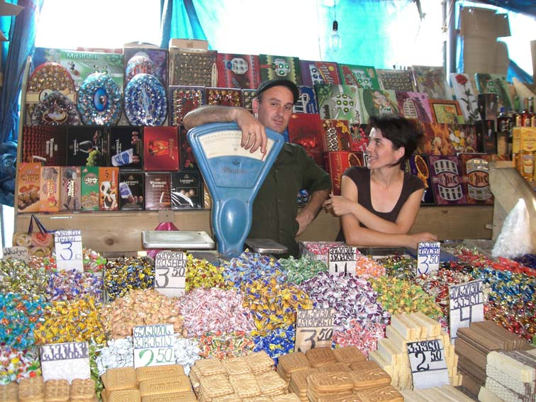 Didube Markt